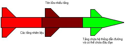 Nguồn : tự vẽ